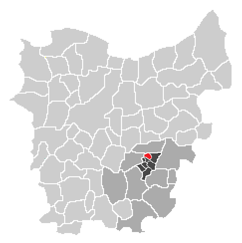 Oost-Vlaanderen uitgeknipt en bewerkt